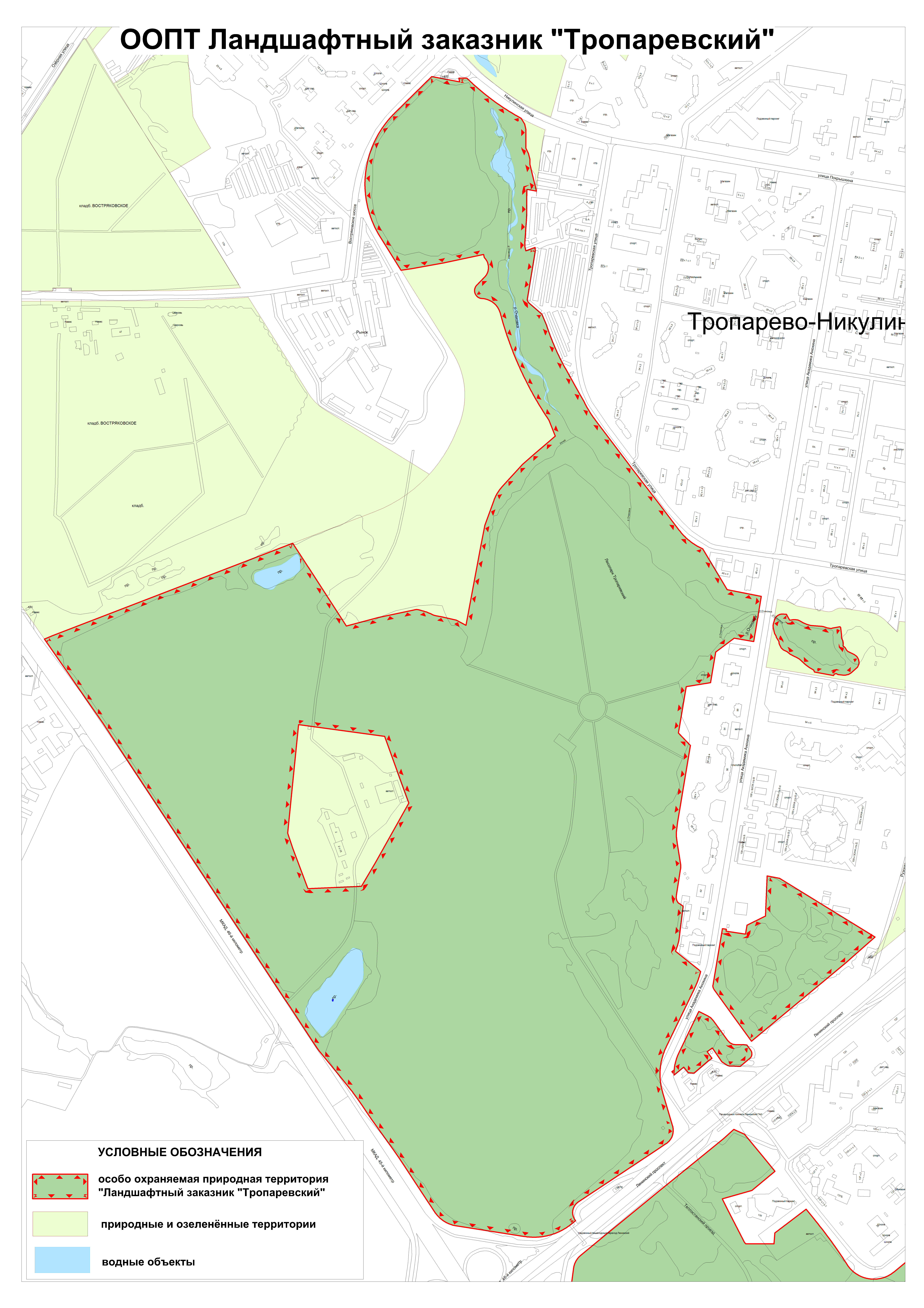 Территория заказника расположена в пределах Теплостанской останцевой эрозионной возвышенности, являющейся частью Москворецко-окской полого-увалистой равнины.